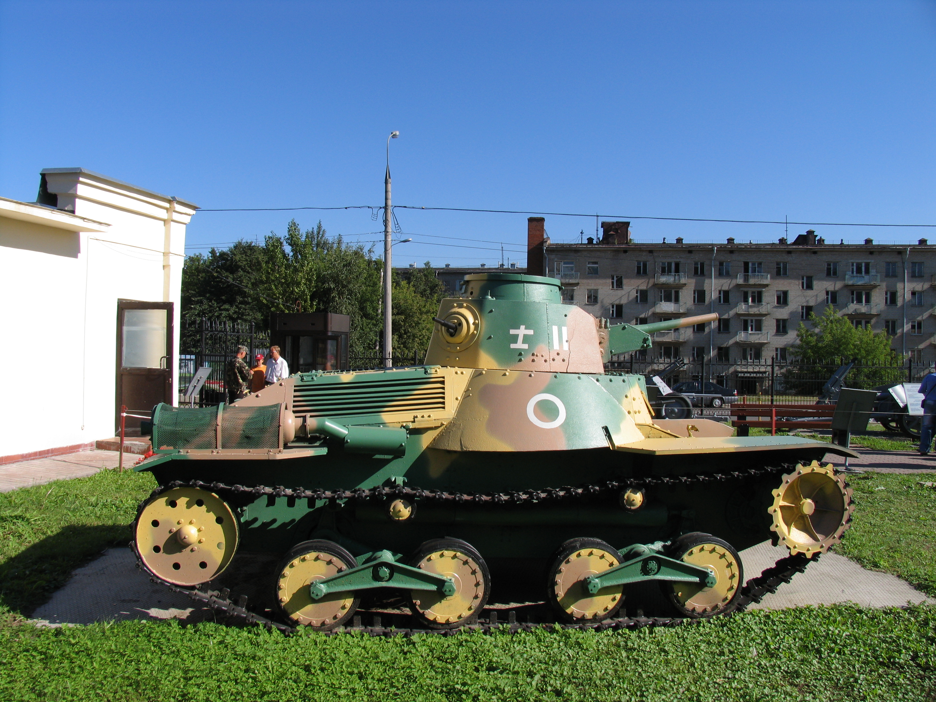 Ha-Go Moscow